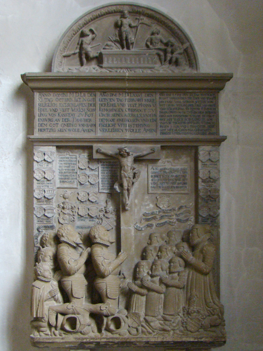 Historisches Grabmal in der Martinskirche in Kirchheim unter Teck